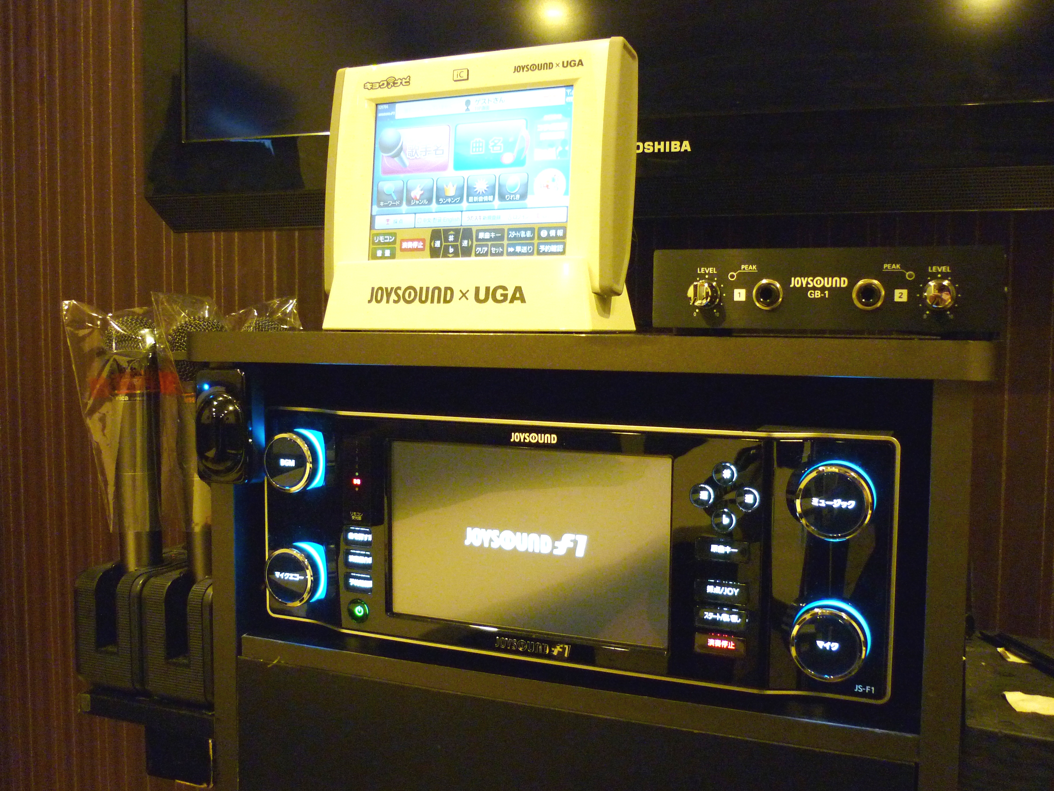 エクシングのカラオケ機種「JOYSOUND f1」(JS-F1)